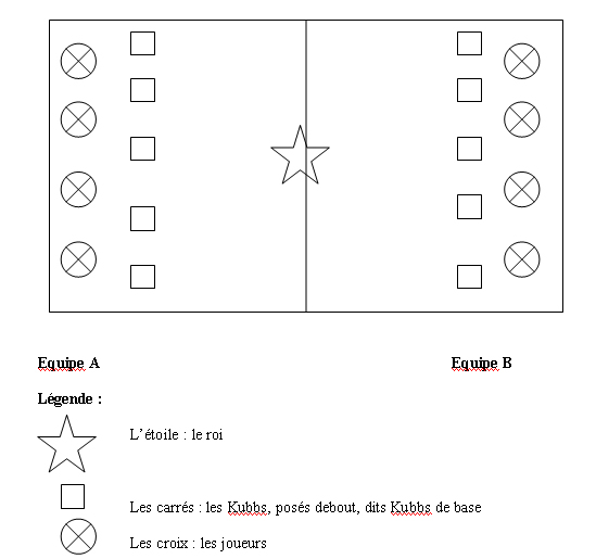 installation du jeu suédois Kubb